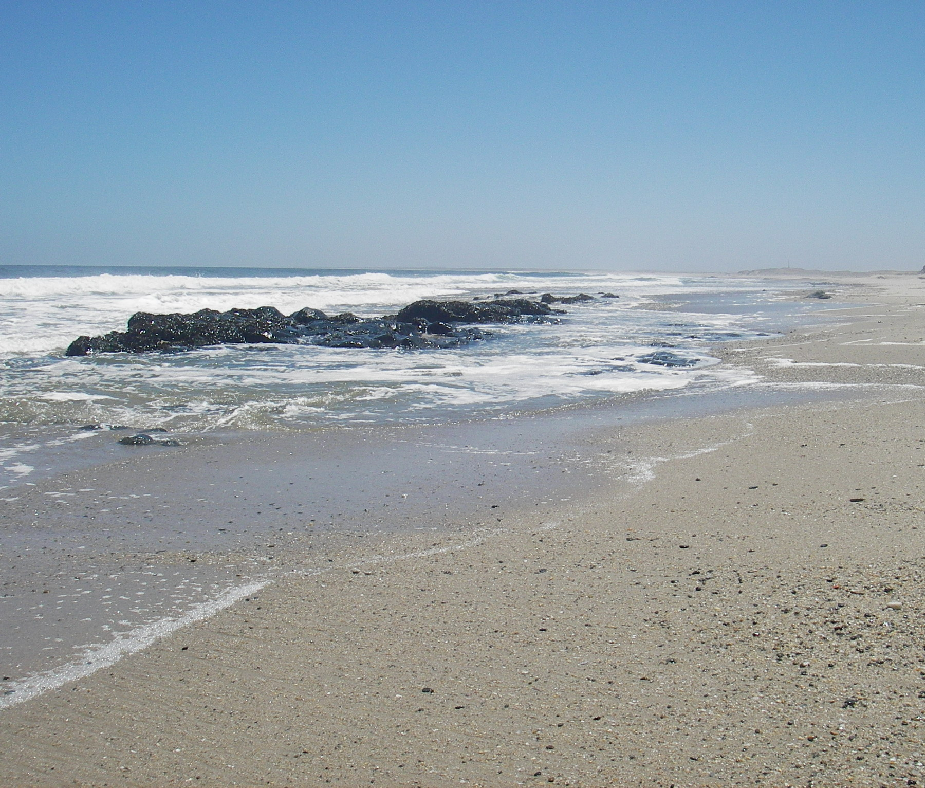 Skeleton Coast Park (Namibia)